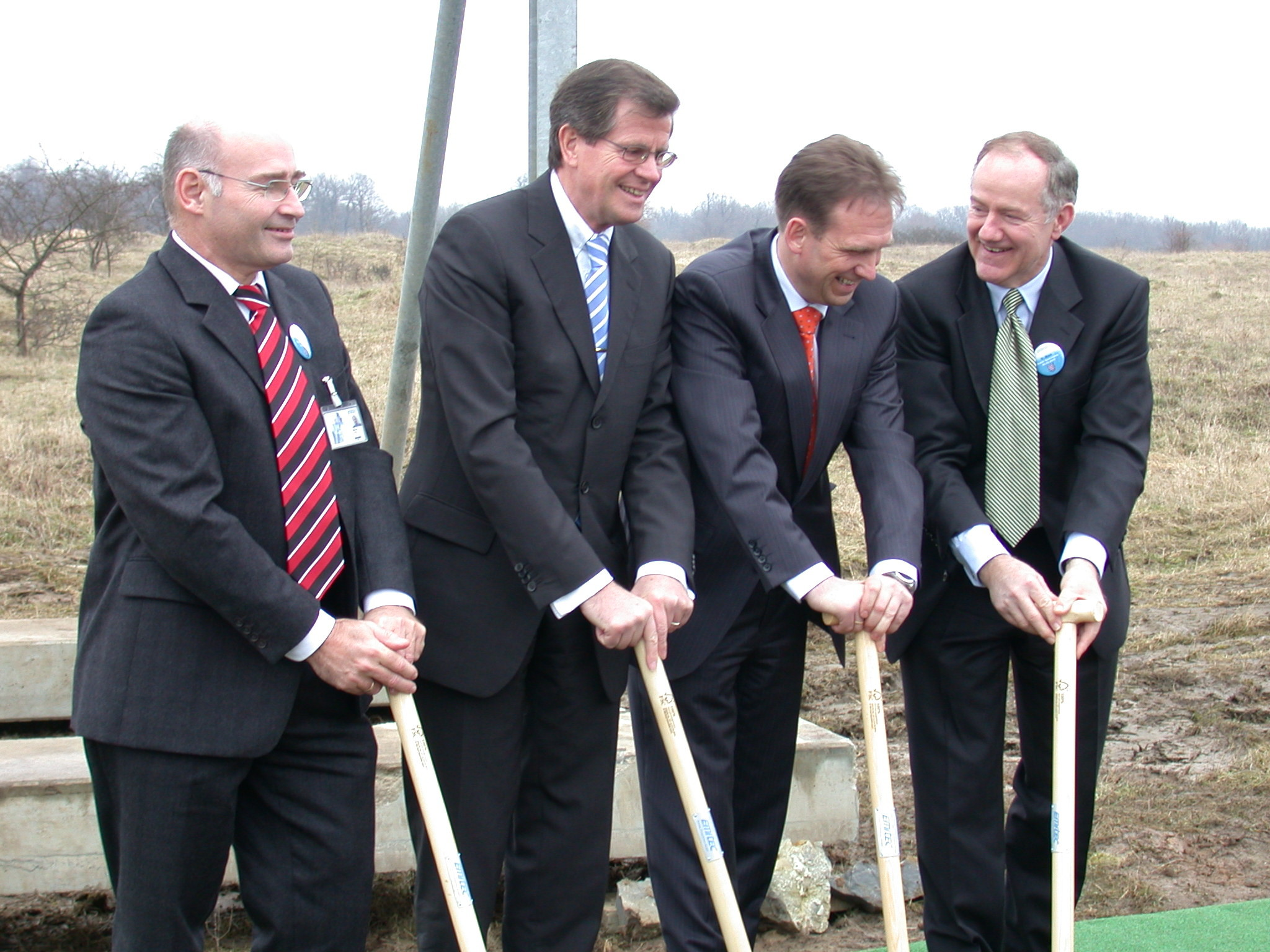 Wolfgang Maus im Februar 2007 beim Spatenstich in Eisenach